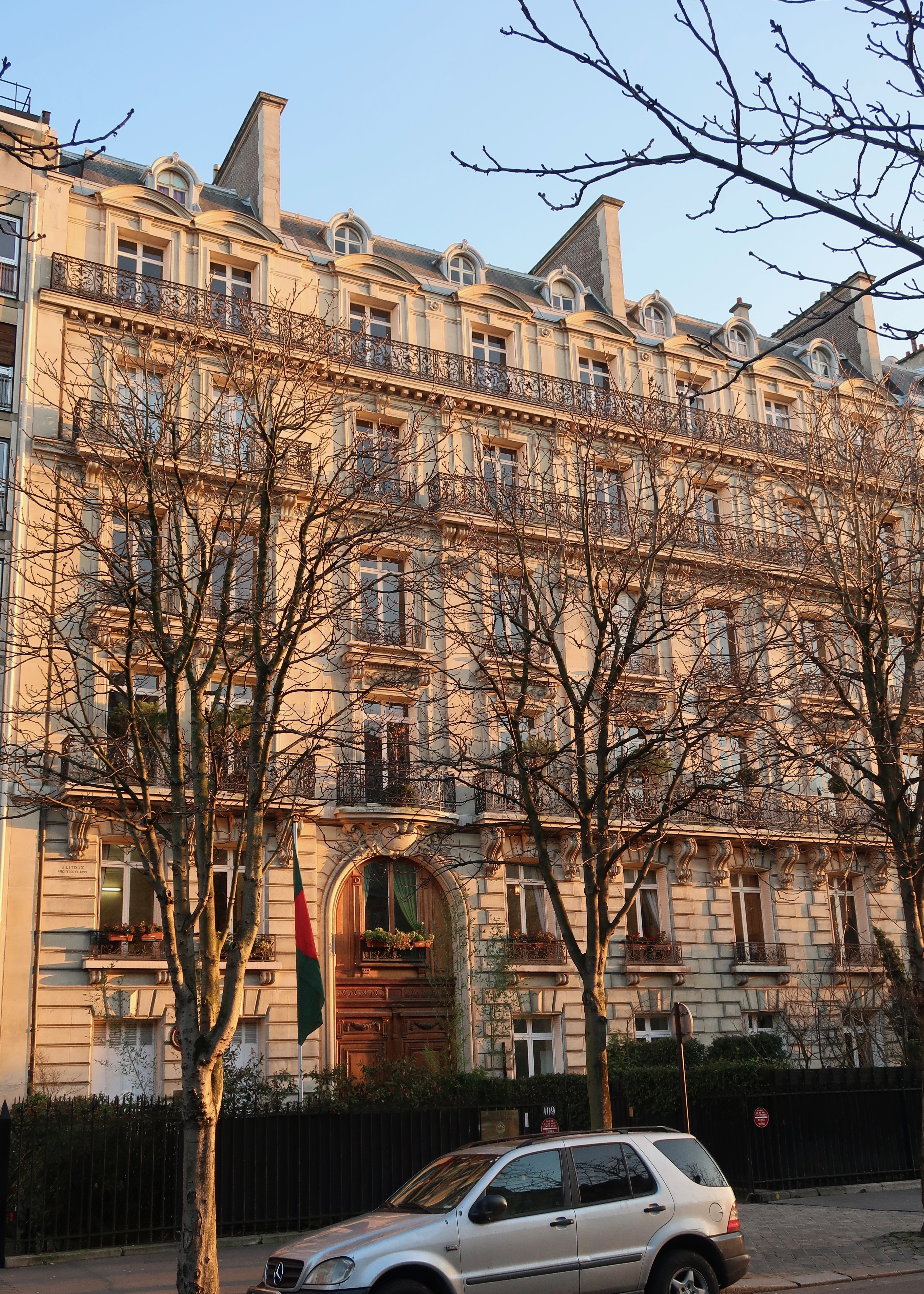 Ambassade du Bangladesh en France, 109 avenue Henri-Martin (Paris, 16e).